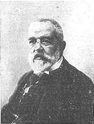 Retrato de Plácido Francés y Pascual, en la revista Nuevo Mundo.